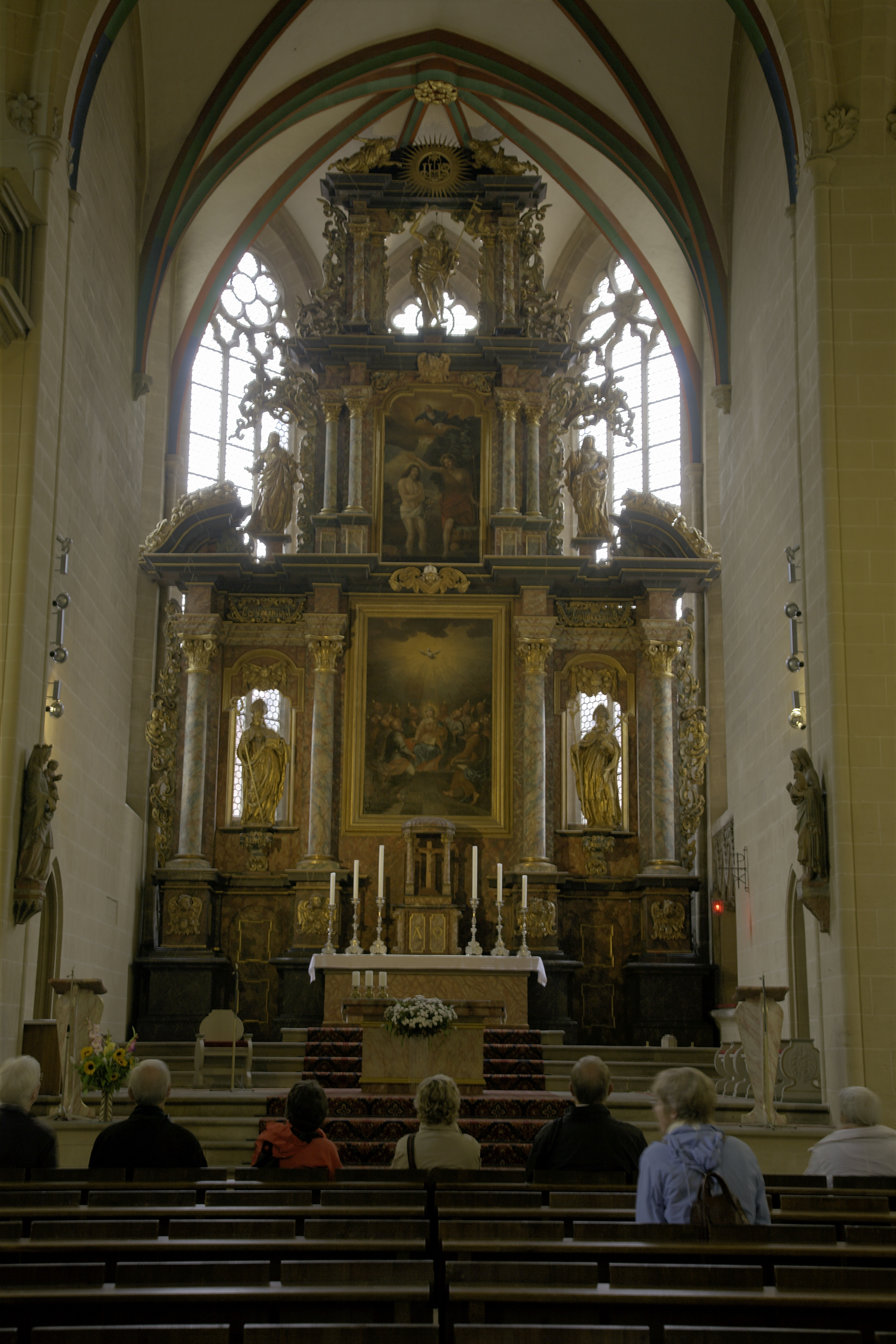 Erfurt Severikirche